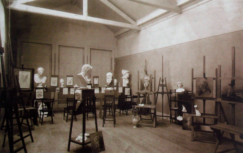 Sala de Escultura do Instituto de Artes da UFRGS.